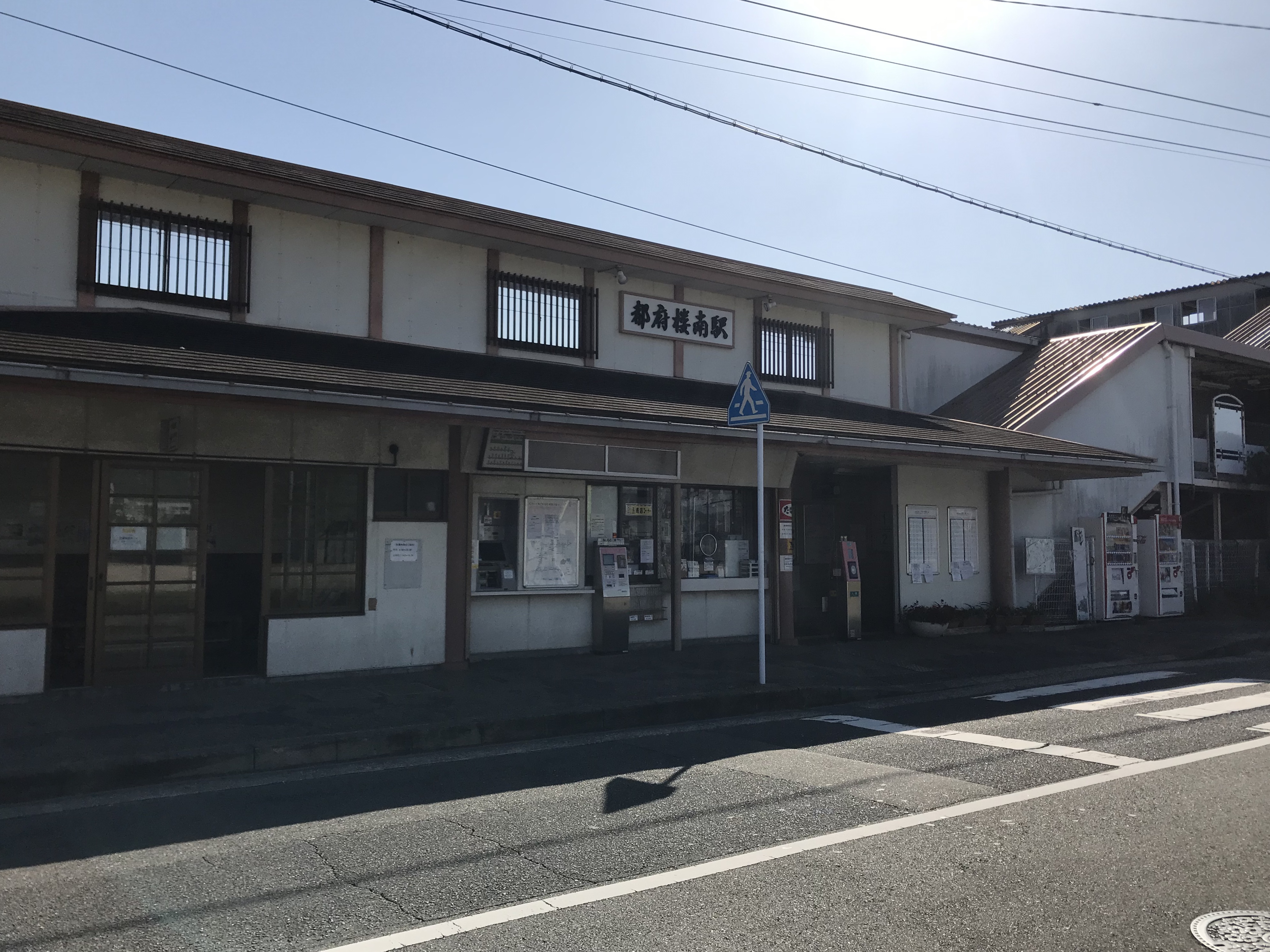 都府楼南駅の駅舎